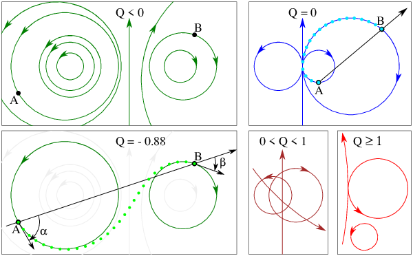 Варианты взаимного расположения двух ориентированных окружностей